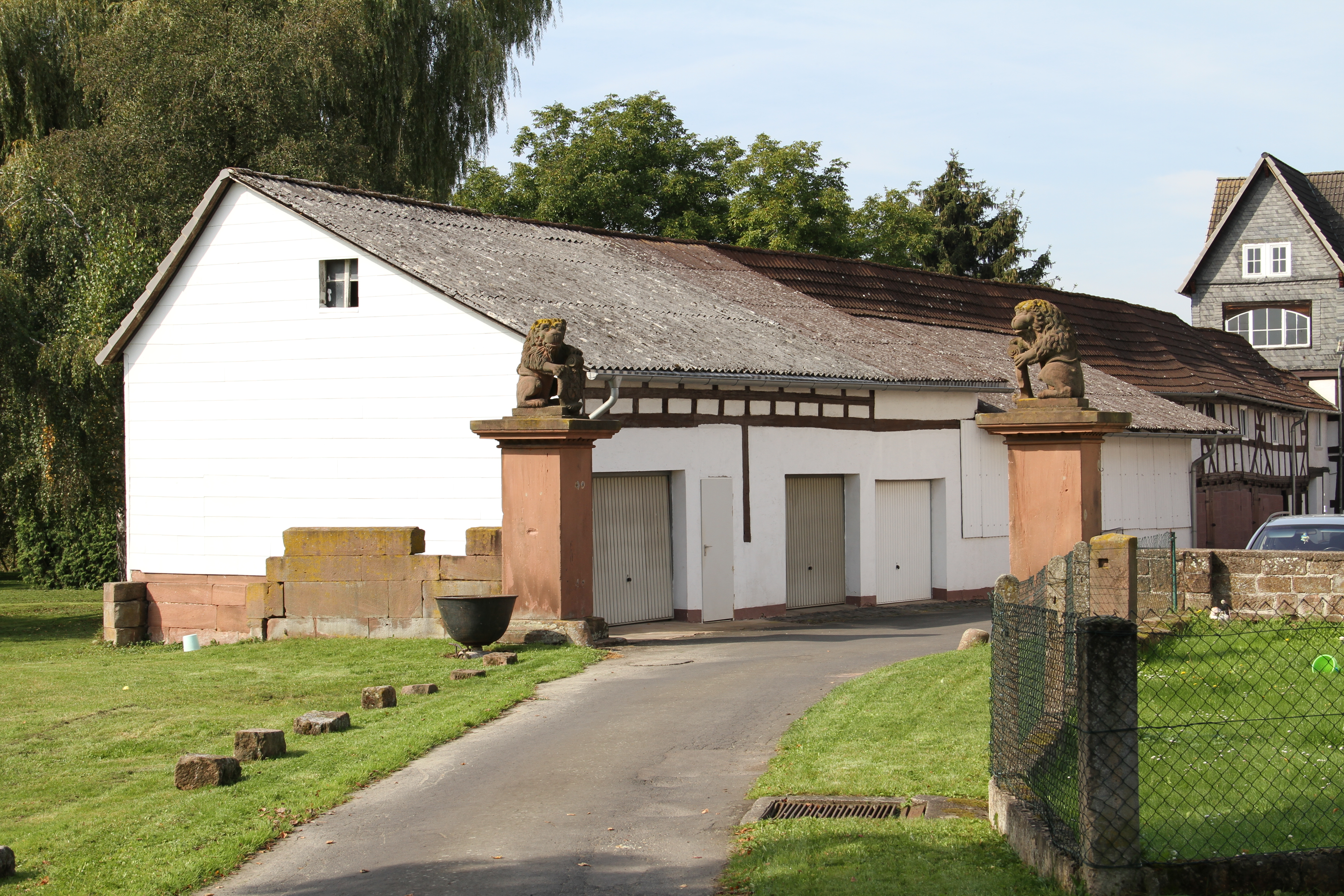 Dieses Foto entstand im Rahmen des Projekts Wiki Loves Monuments Mittelhessen, das aus dem Community-Projektbudget von Wikimedia Deutschland e. V. gefördert wurde.